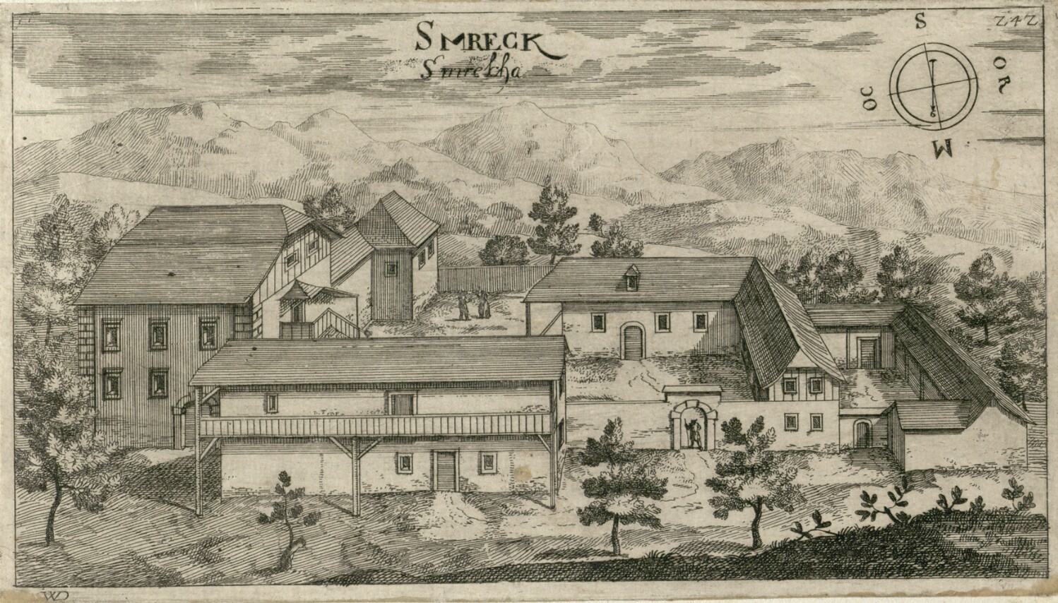 Grad Podsmreka